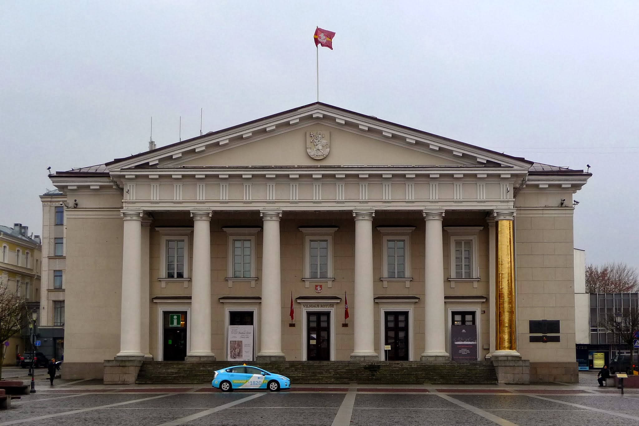 Vilnius City Hall